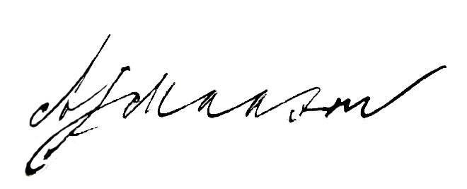 André Maasen signature.